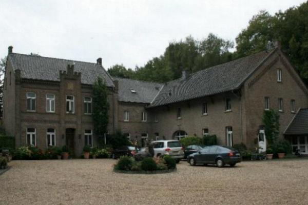 Denkmal Nr. 26 in Tönisvorst